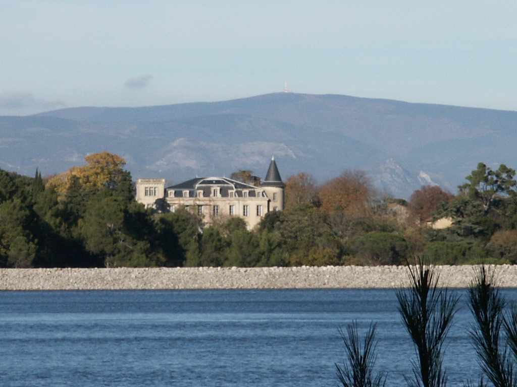 Eigen foto 11-2004 Heiko van Iddekinge